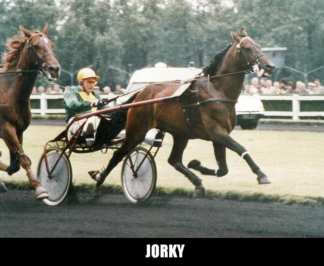 [JORKY]cheval de course au trot (trotteur)